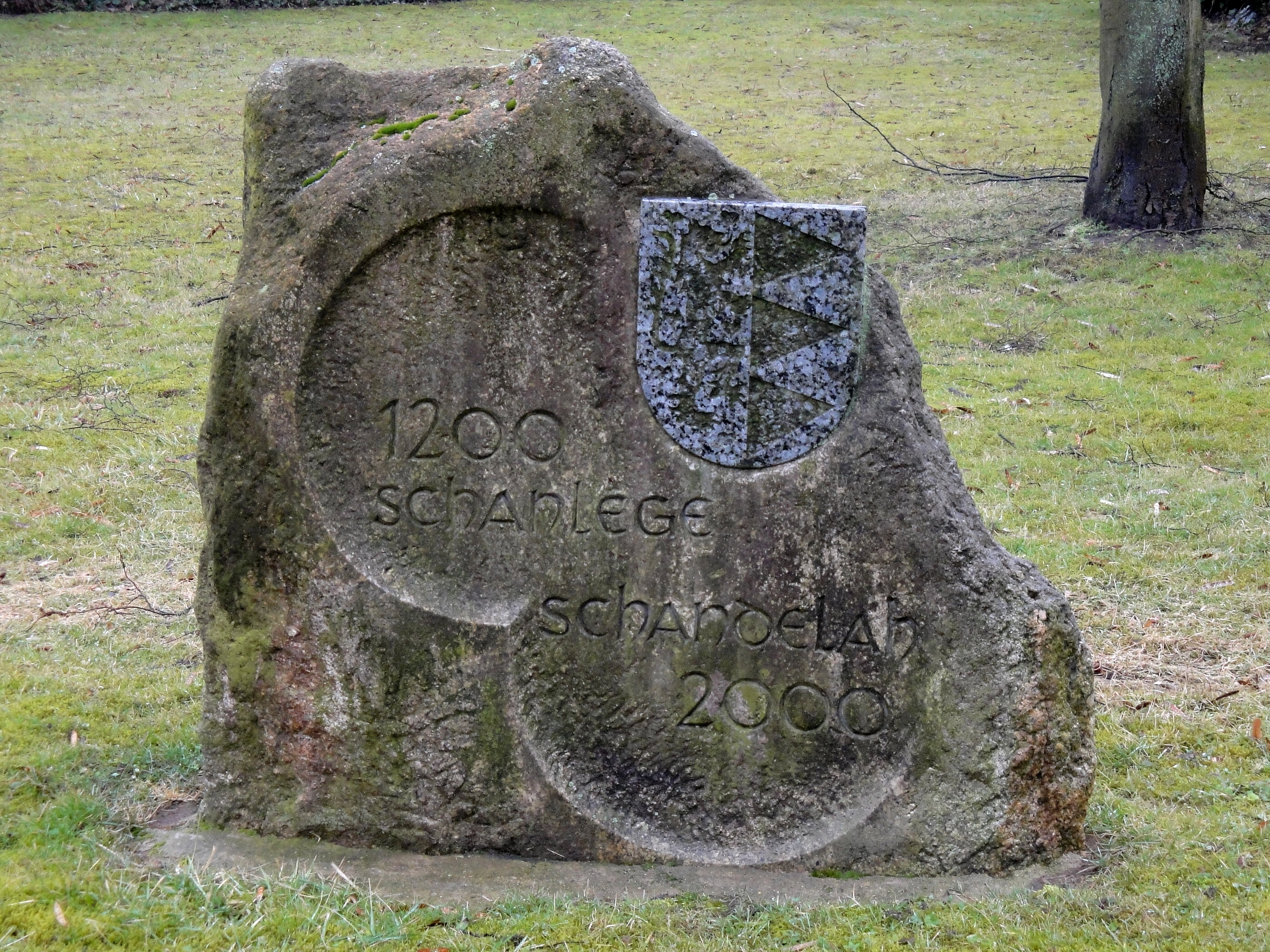 Gedenkstein (1200 Schanlege Schandelah 2000) in Schandelah